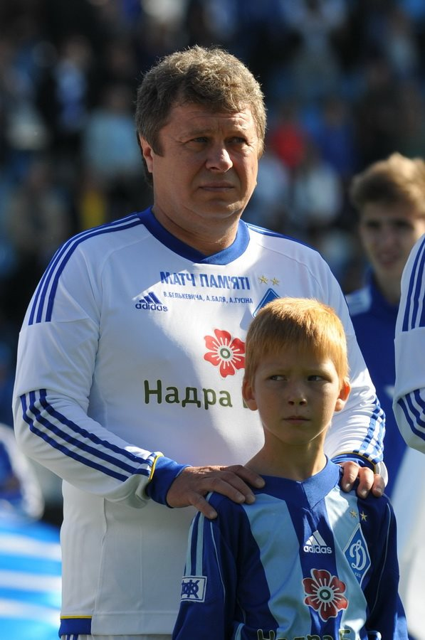 Олександр Заваров на Матчі пам'яті Белькевича, Баля і Гусіна